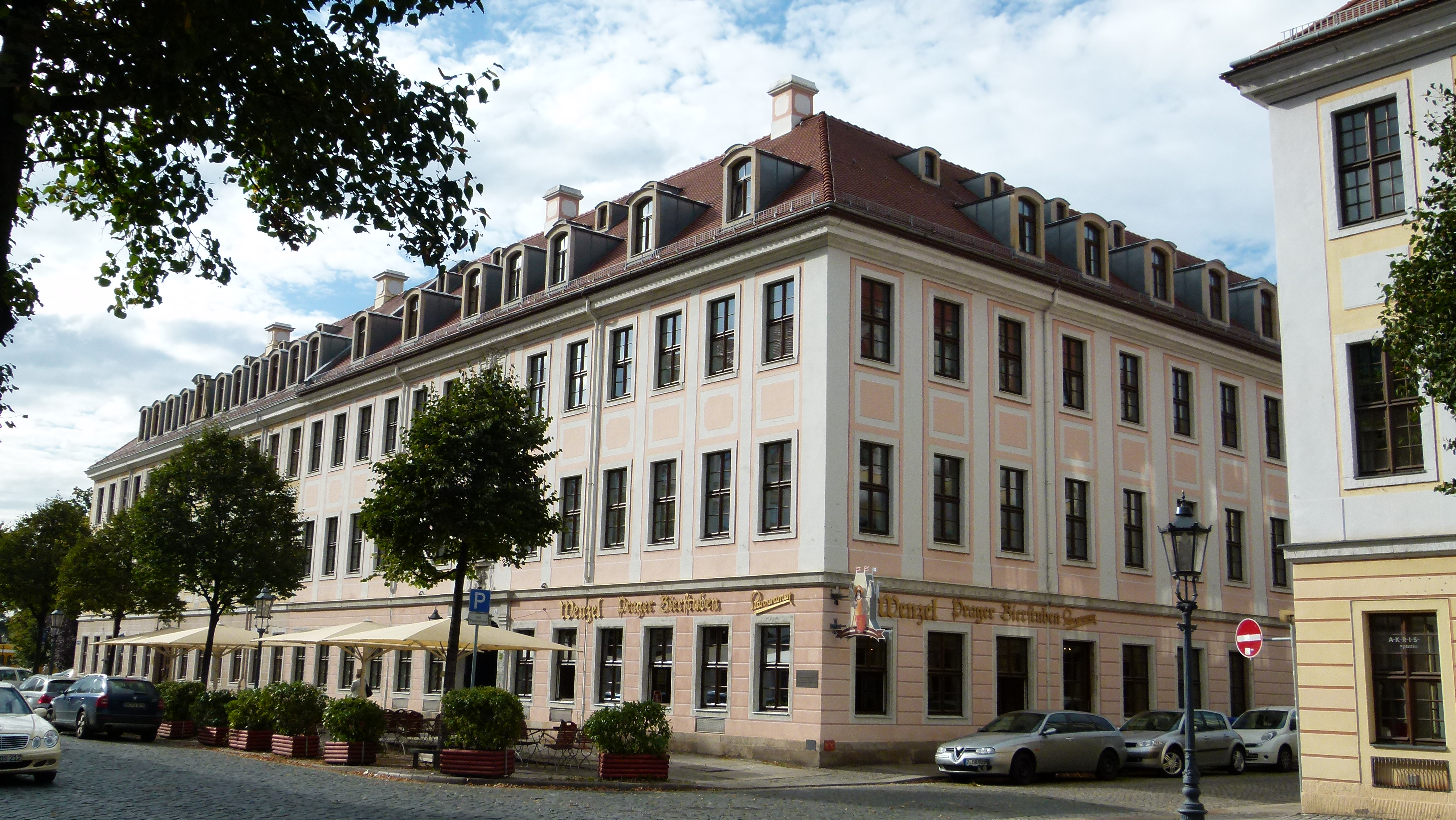 Denkmalgeschütztes Gebäude Königstraße 1 in Dresden